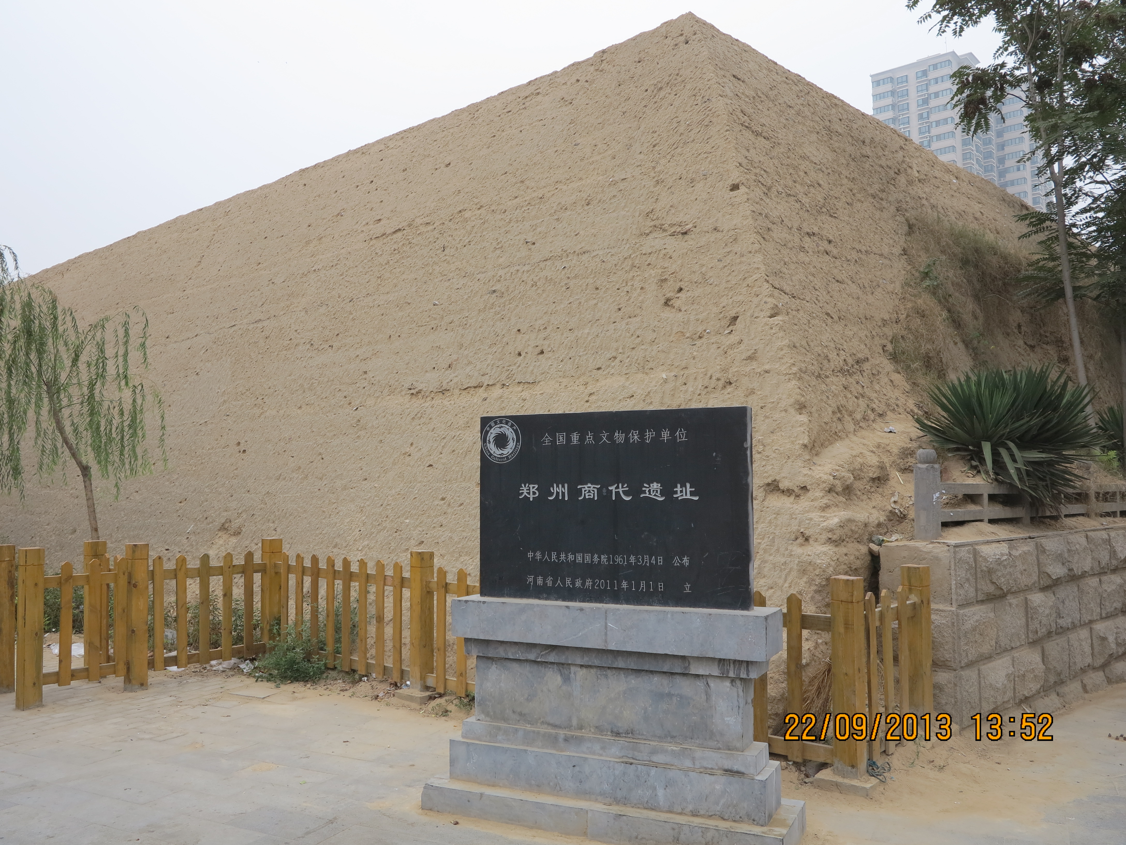 中文（中国大陆）: 郑州商城遗址